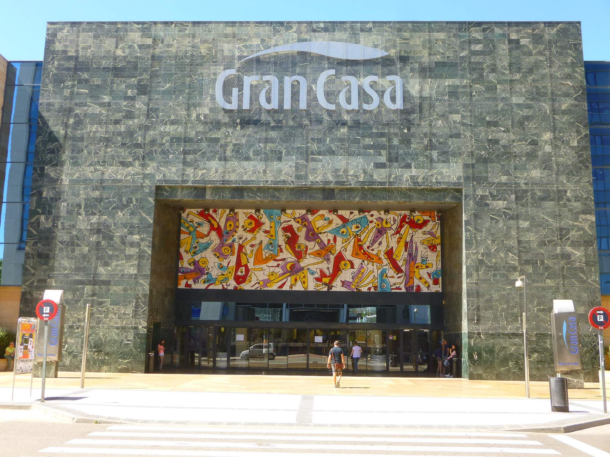 Zaragoza - Centro Comercial GranCasa